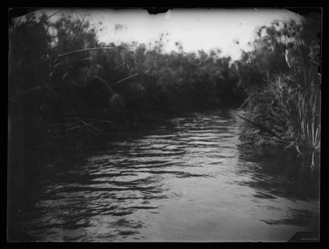 Marais en Sicile, photographie prise depuis une barque, au ras de l'eau, des papyrus de chaque côté, le lit de l'eau partant sur la droite. Technique : Négatif au gélatino-bromure d'argent Support : Plaque de verre Taille : 9x12cm